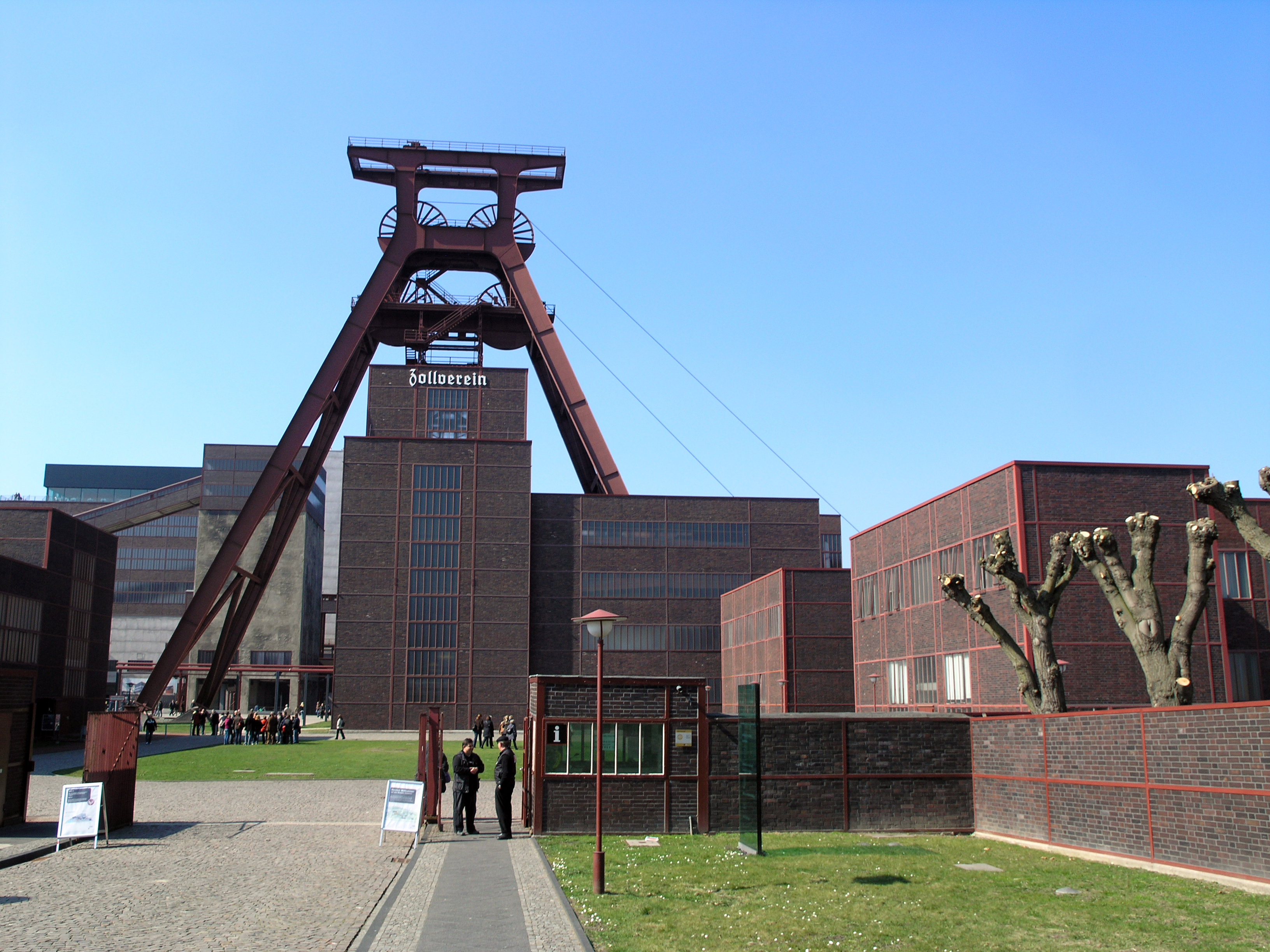 Северный Рейн - Вестфалия, Эссен. Шахта Цольферайн, шахта 12